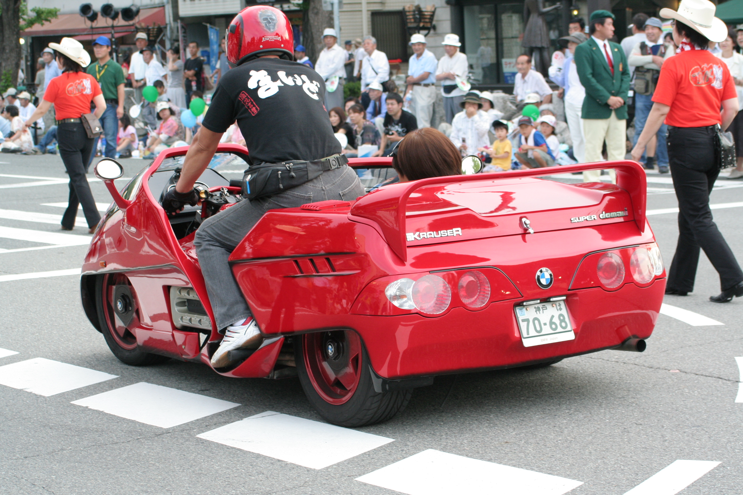 姫路お城祭り。2010年8月6日から9日の3日間に兵庫県姫路市にて開催された姫路の祭り。2日目の大手前公園および大手前通りでのパレードの模様。